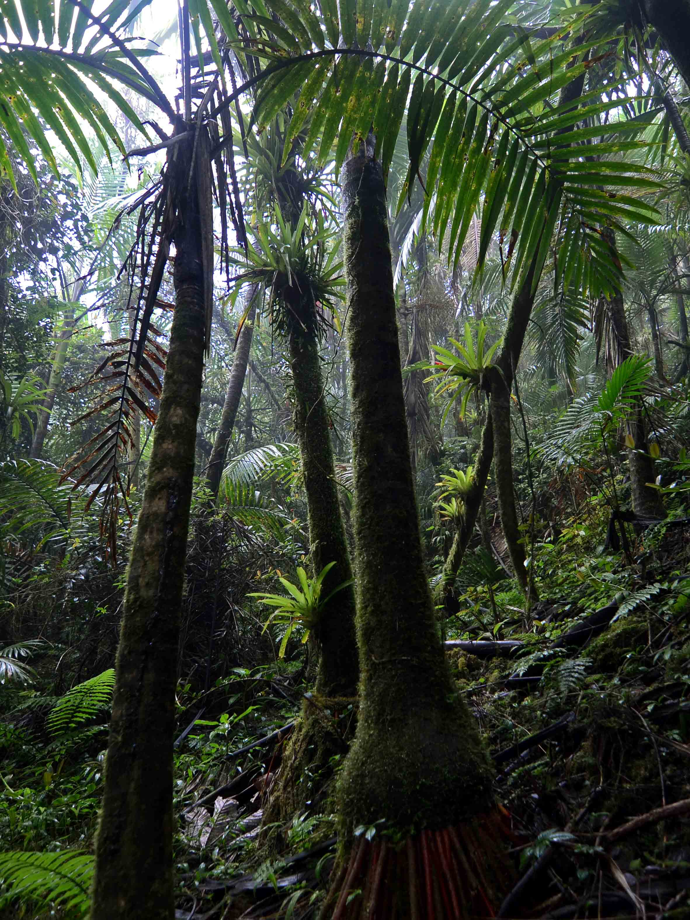 Arecaceae: Gaussia attenuata El Yunque, Puerto Rico